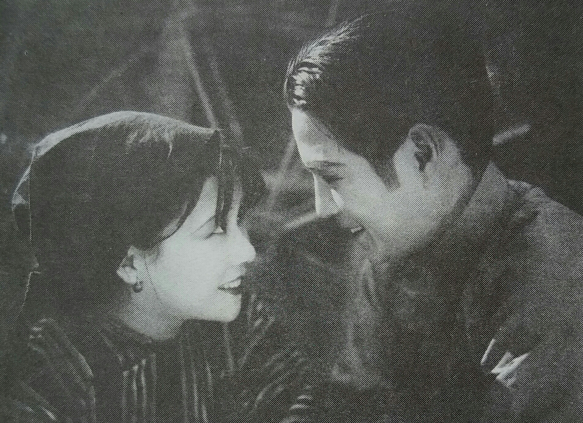 《桃花泣血记》剧照